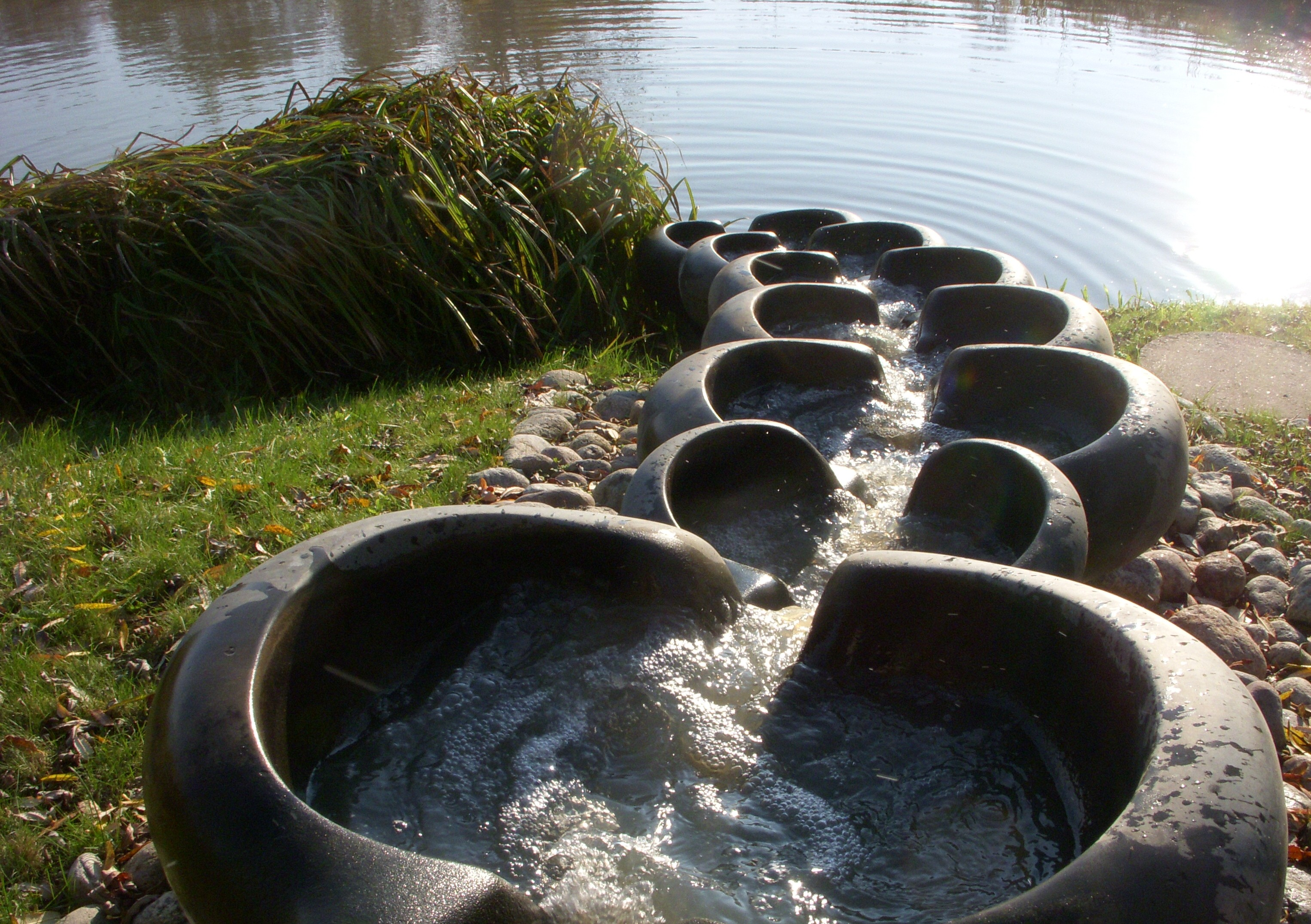 Tullgarns biologiska dammar, avloppsreningsverket